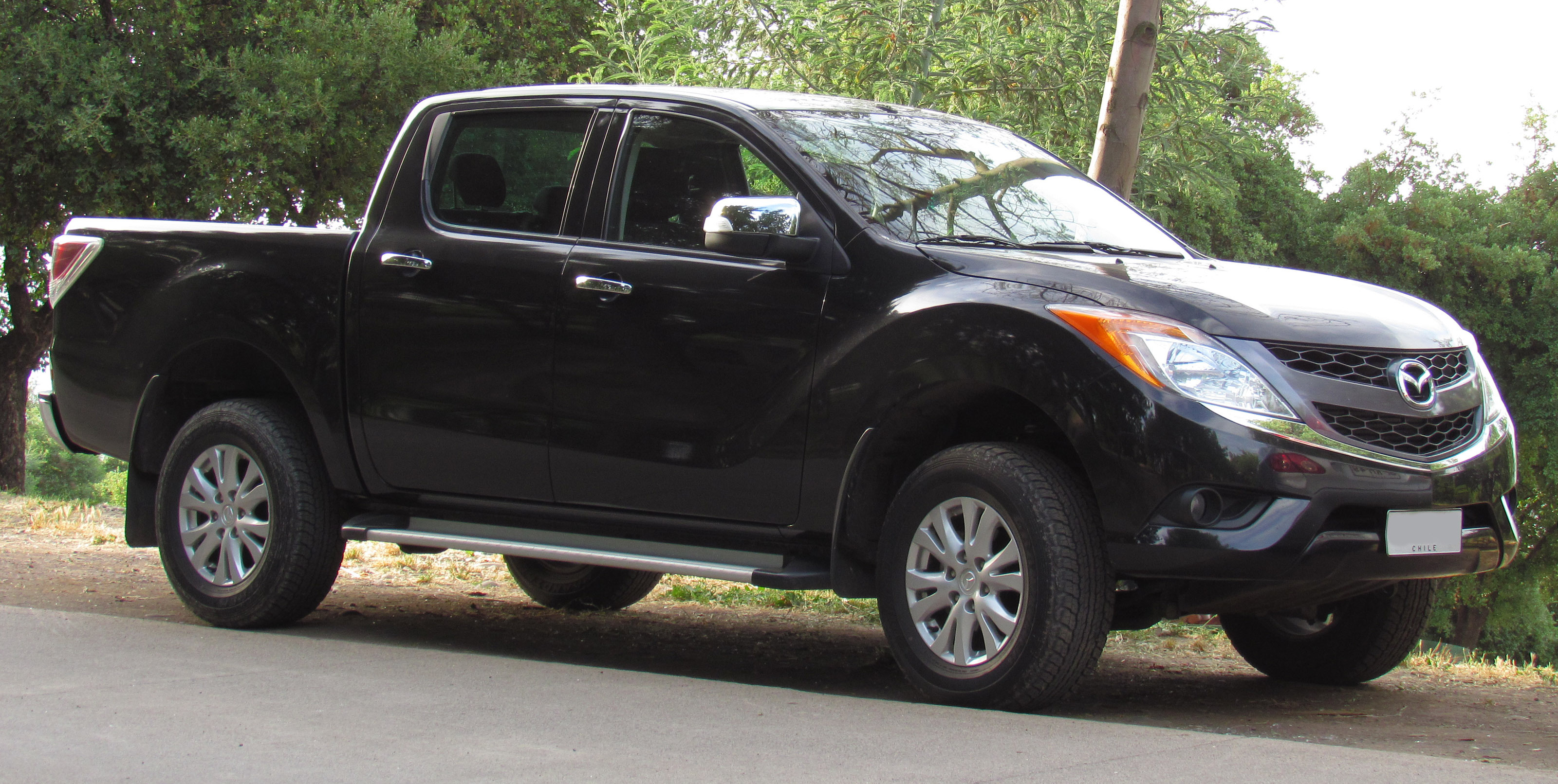 Mazda BT-50 SDX 2.2 TDCi 4x4 2014